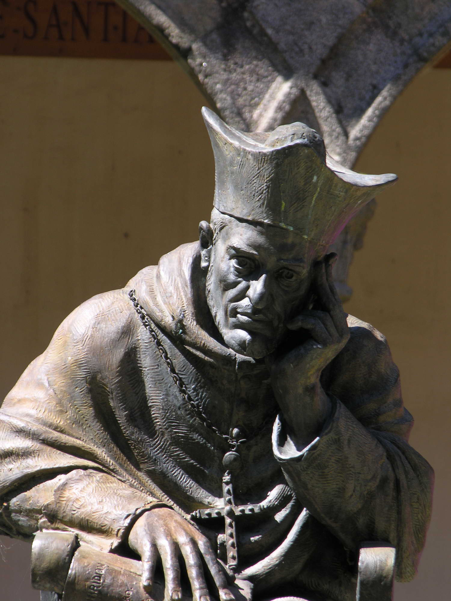 self made.